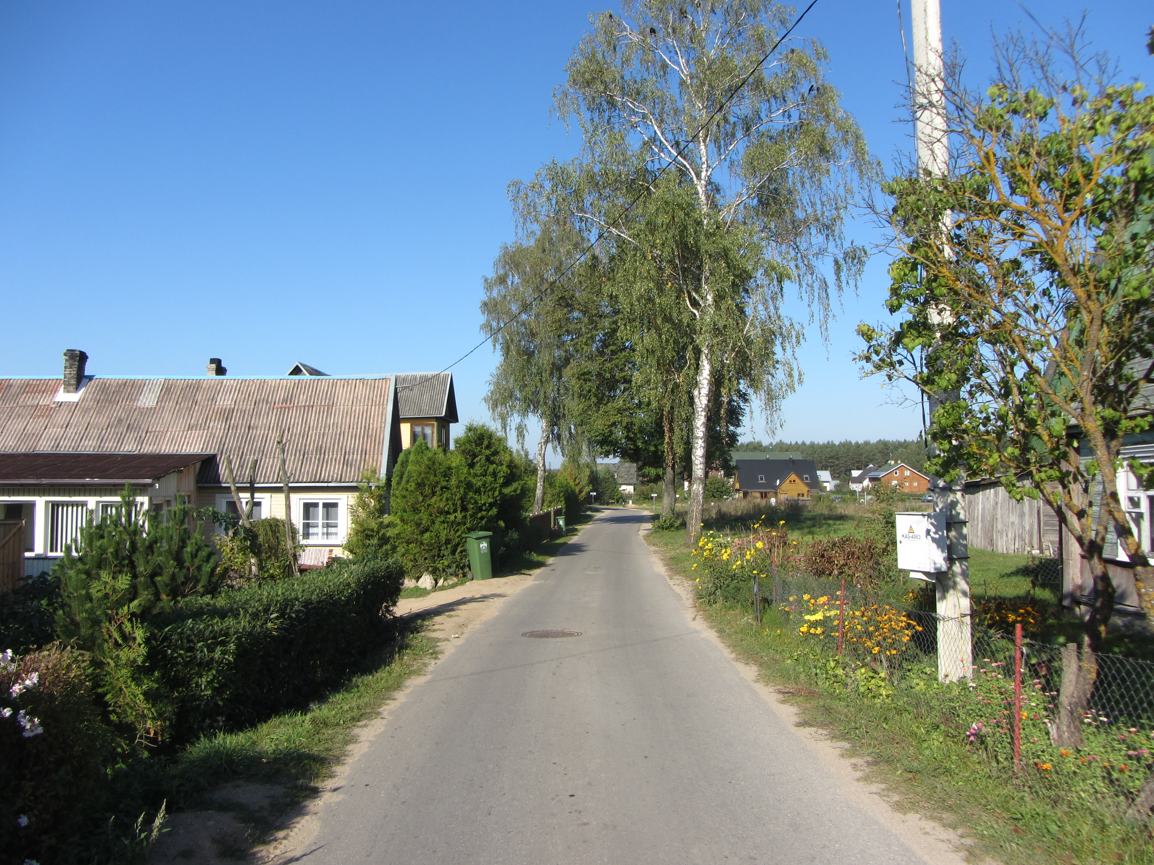 Trakai, Lithuania